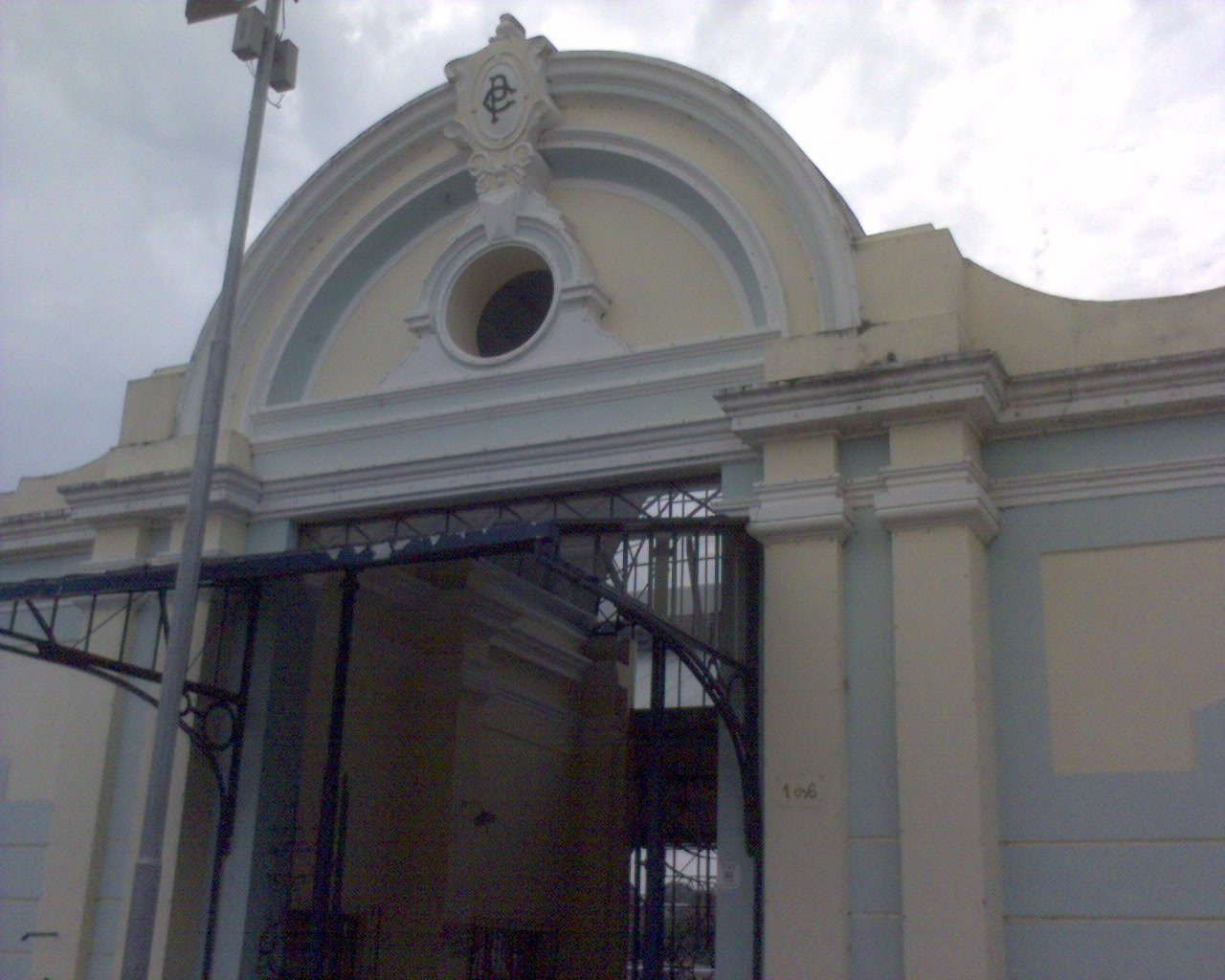 Estação de Trem - Americana, São Paulo, Brasil